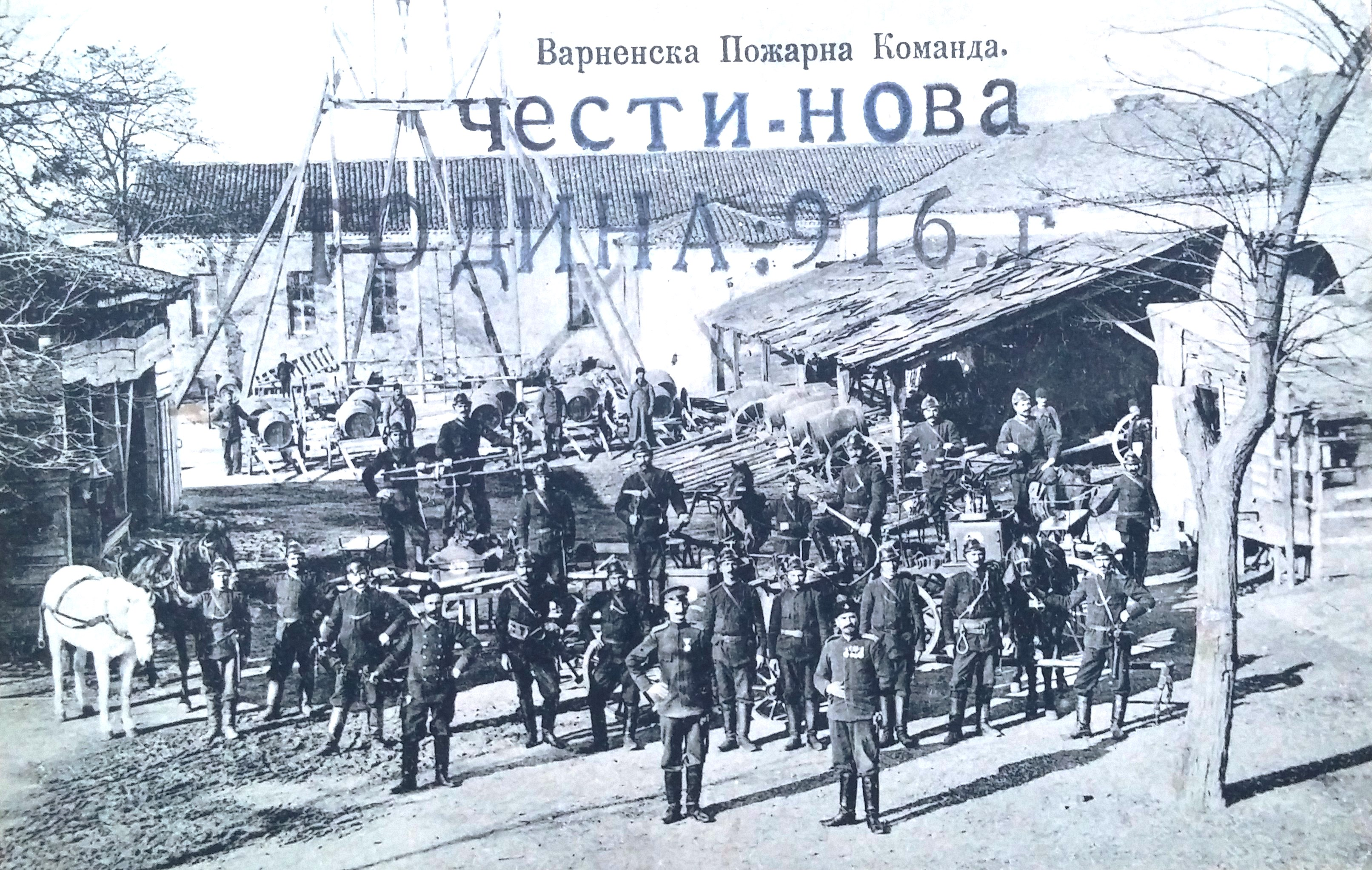 Пощенска картичка със служители от Пожарната команда – Варна.